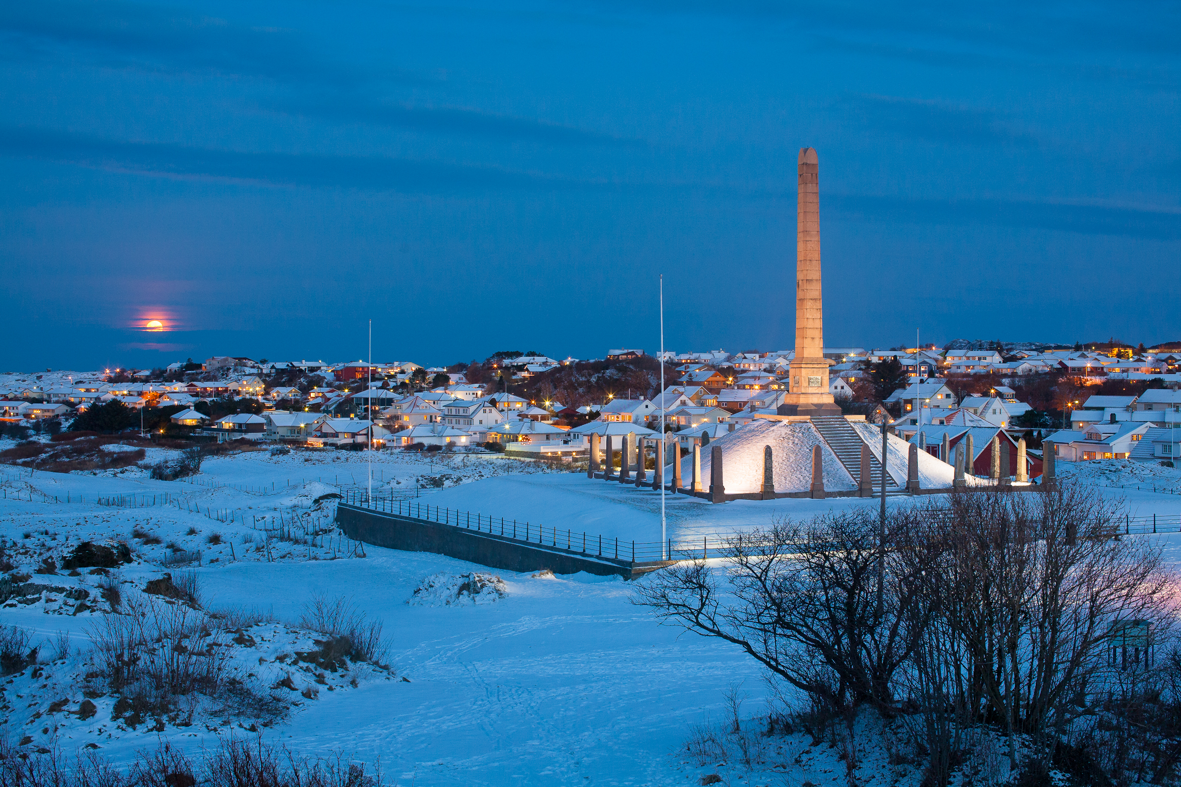 Haraldshaugen under måneformørkelse